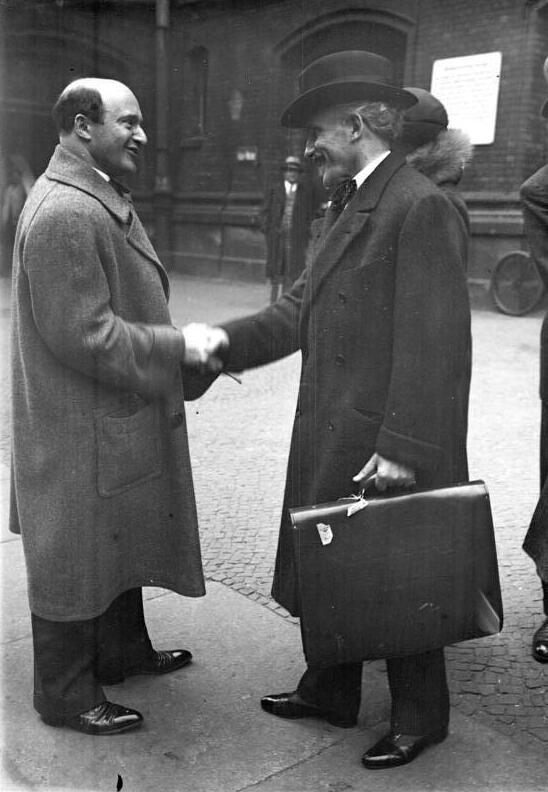 Der weltberühmte Komponist und Dirigent der Mailänder Scala ist mit seinem philharmonischen Orchester in Berlin eingetroffen! Der weltberühmte Komponist Arturo Toscanini (rechts) wird auf dem Anhalter Bahnhof in Berlin von dem General-Musikdirektor der staatlichen Opern Dr. Kleiber (inks) empfangen.